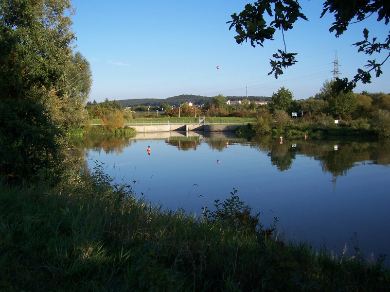 Auslassbauwerk aus dem Altmühlsee zum Altmühlüberleiter bei Schlungenhof; der Düker unterquert die Bundesstraße 13)